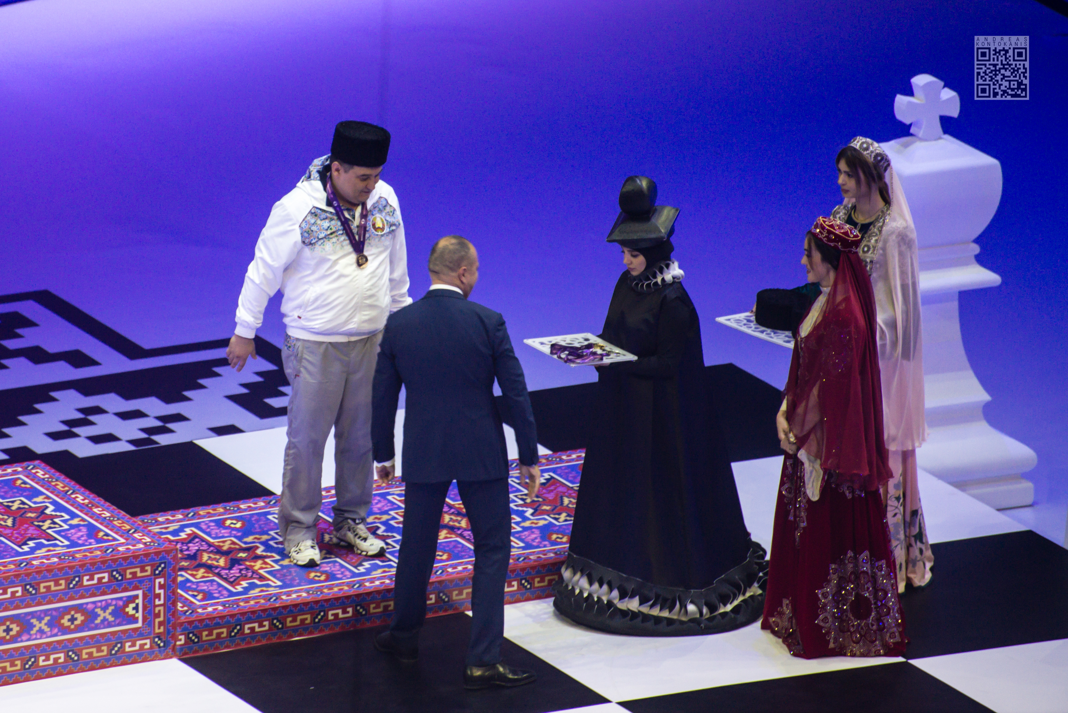 GM Aleksandrov Aleksej receives his medal